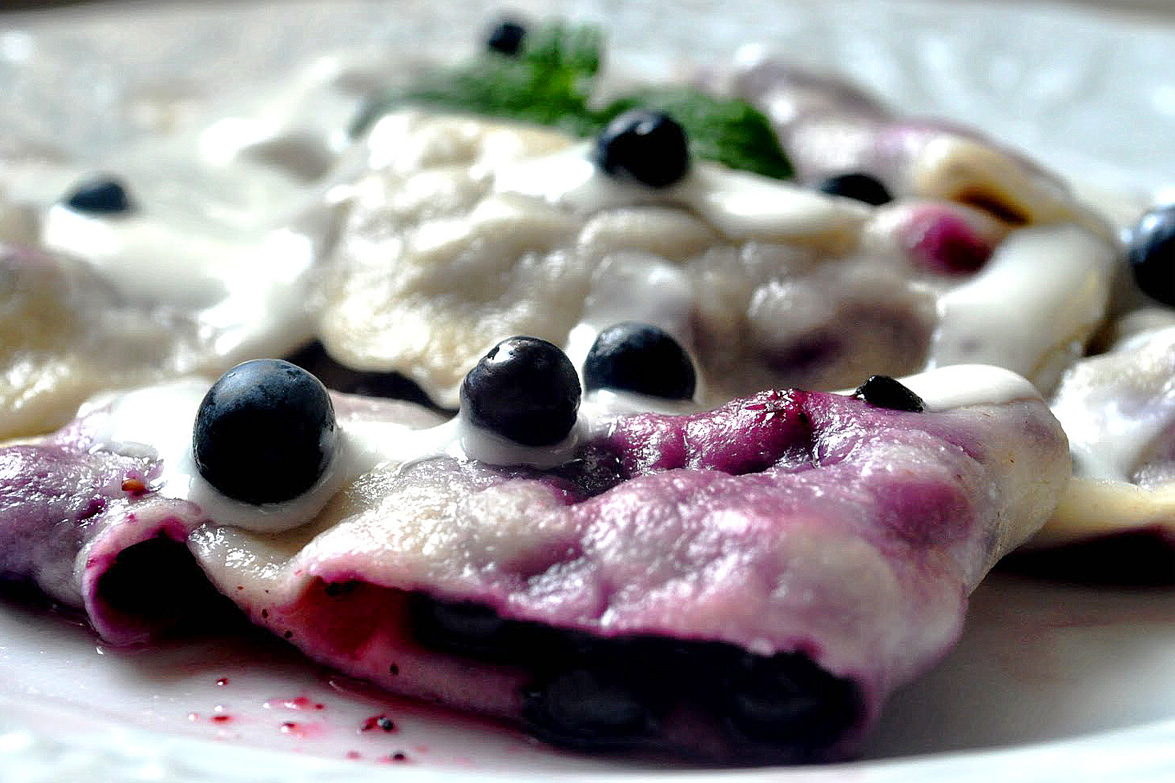 yummy